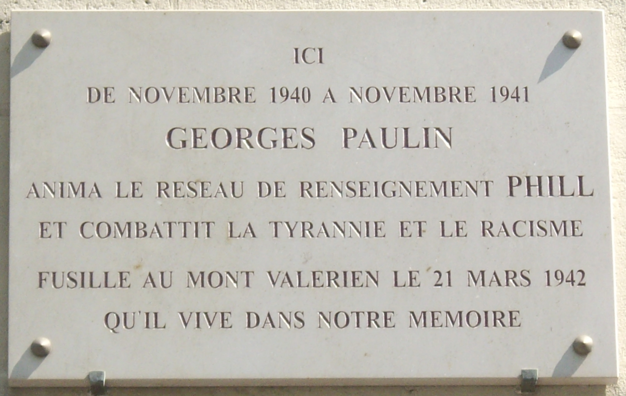 Plaque commémorative, 3 place du 18-Juin-1940, Paris 6e. « Ici de novembre 1940 à novembre 1941, Georges Paulin anima le réseau de renseignement PHILL et combattit la tyrannie et le racisme. Fusillé au mont Valérien le 21 mars 1942. Qu'il vive dans notre mémoire. »